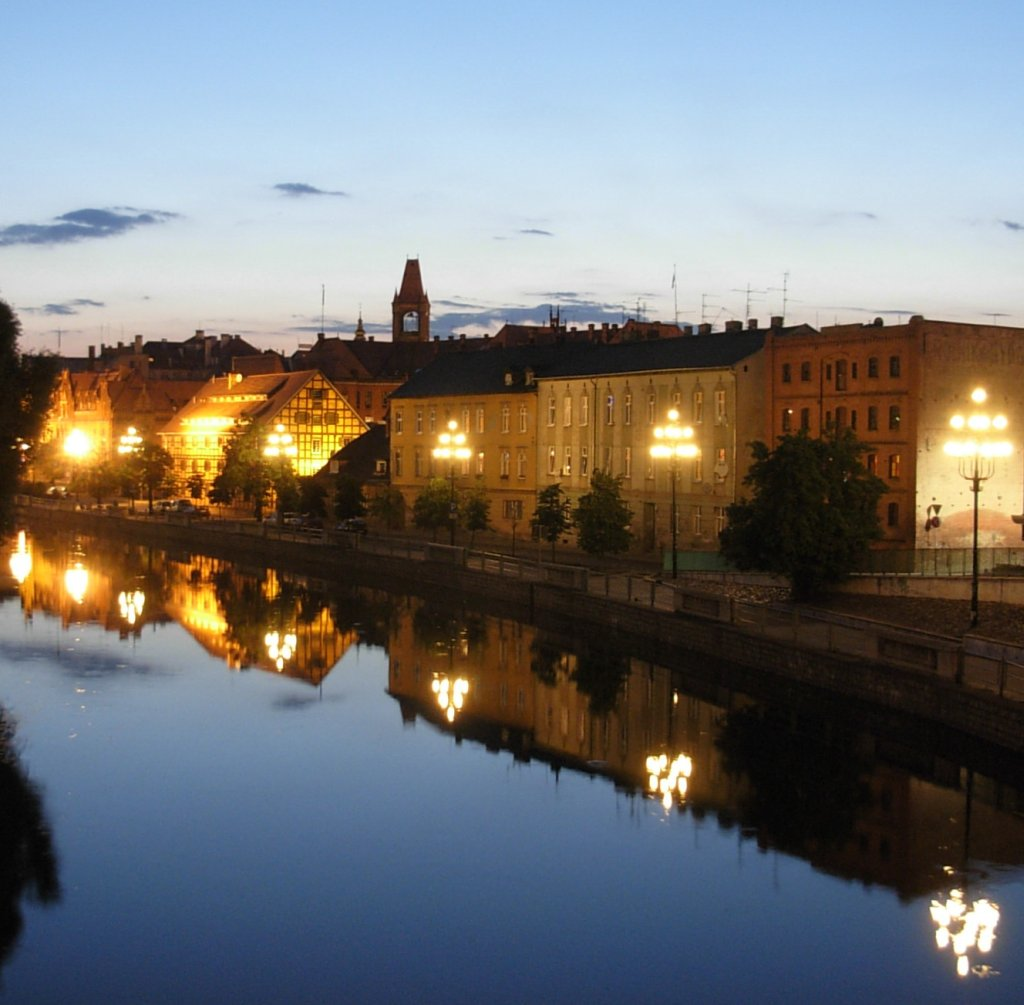 Ulica Stary Port w Bydgoszczy, bulwar nad Brdą o zmierzchu